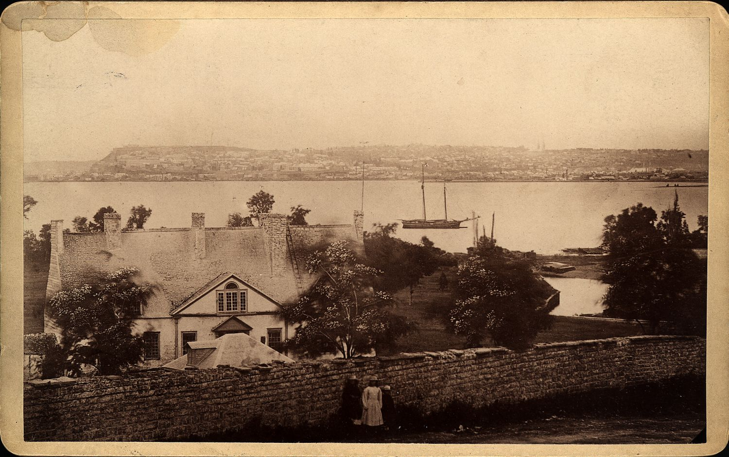 Manoir seigneurial de Beauport au bord de la rivière Beauport vers 1870 Manoir de Robert Giffard vers 1870, Domaine Darnoc, L.P. Vallée, BAnQ, collection initiale, P600,S6,D2,P52.